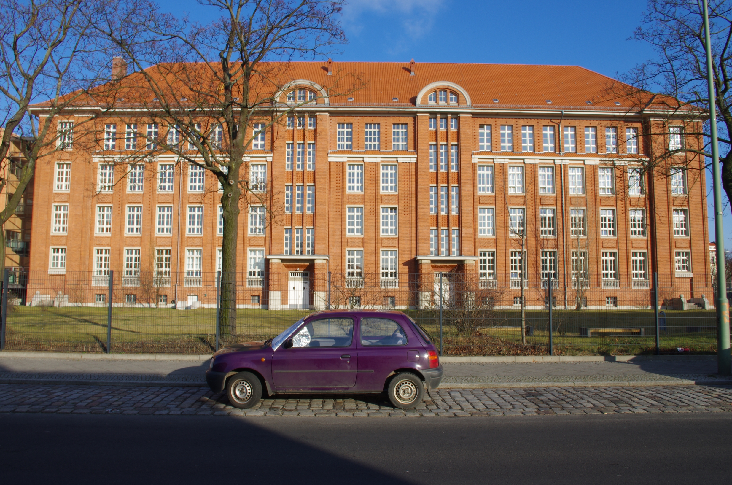 Berlin-Oberschöneweide. Das Haus der Gemeindeschule 6 und 7 steht unter Denkmalschutz.